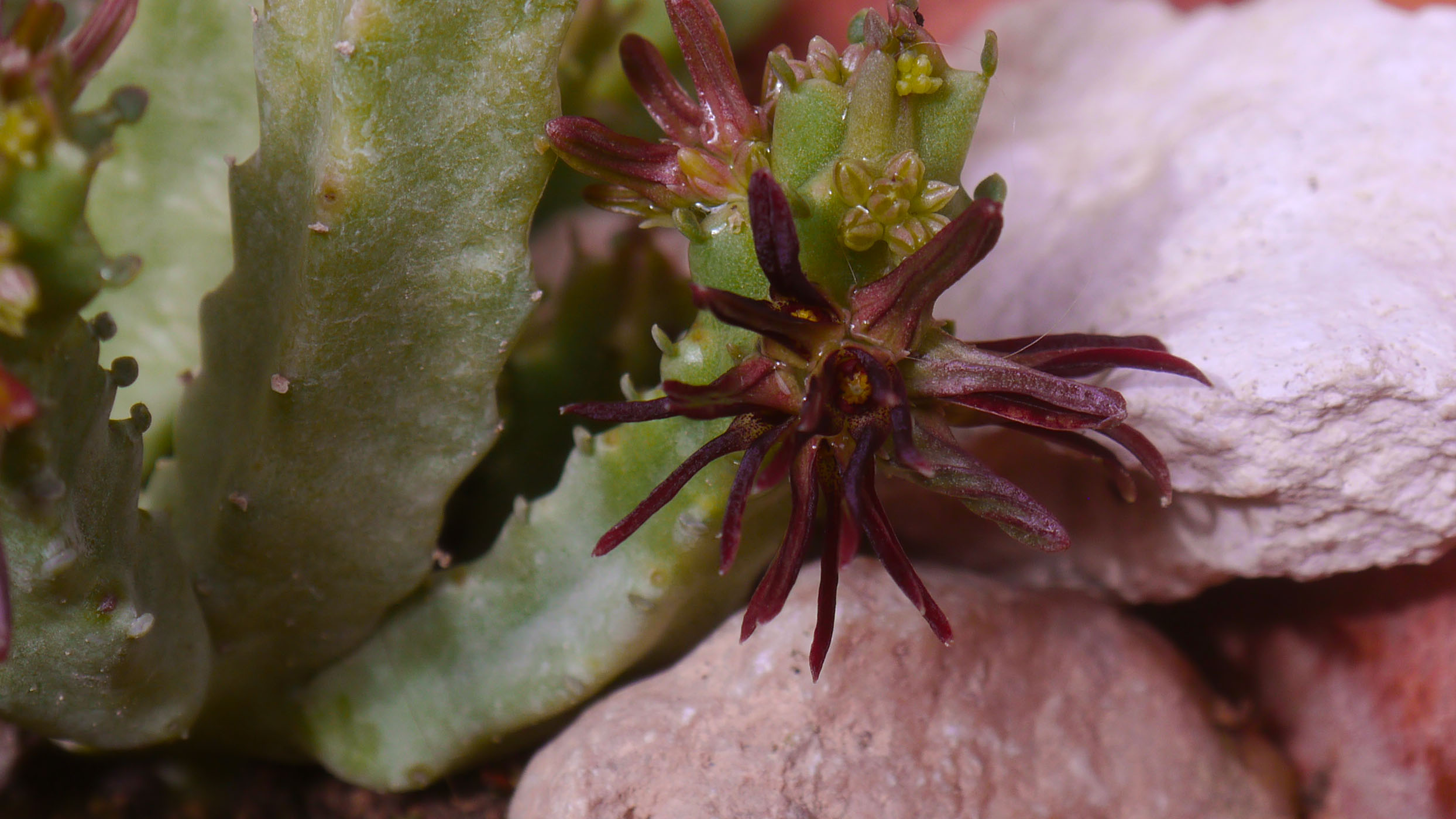 Caralluma munbyana en flor.